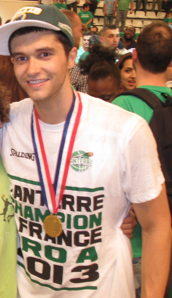 Trenton Meacham champion de France 2013 de basket en Pro A avec Nanterre. Lors du match 4 des finales des playoffs.